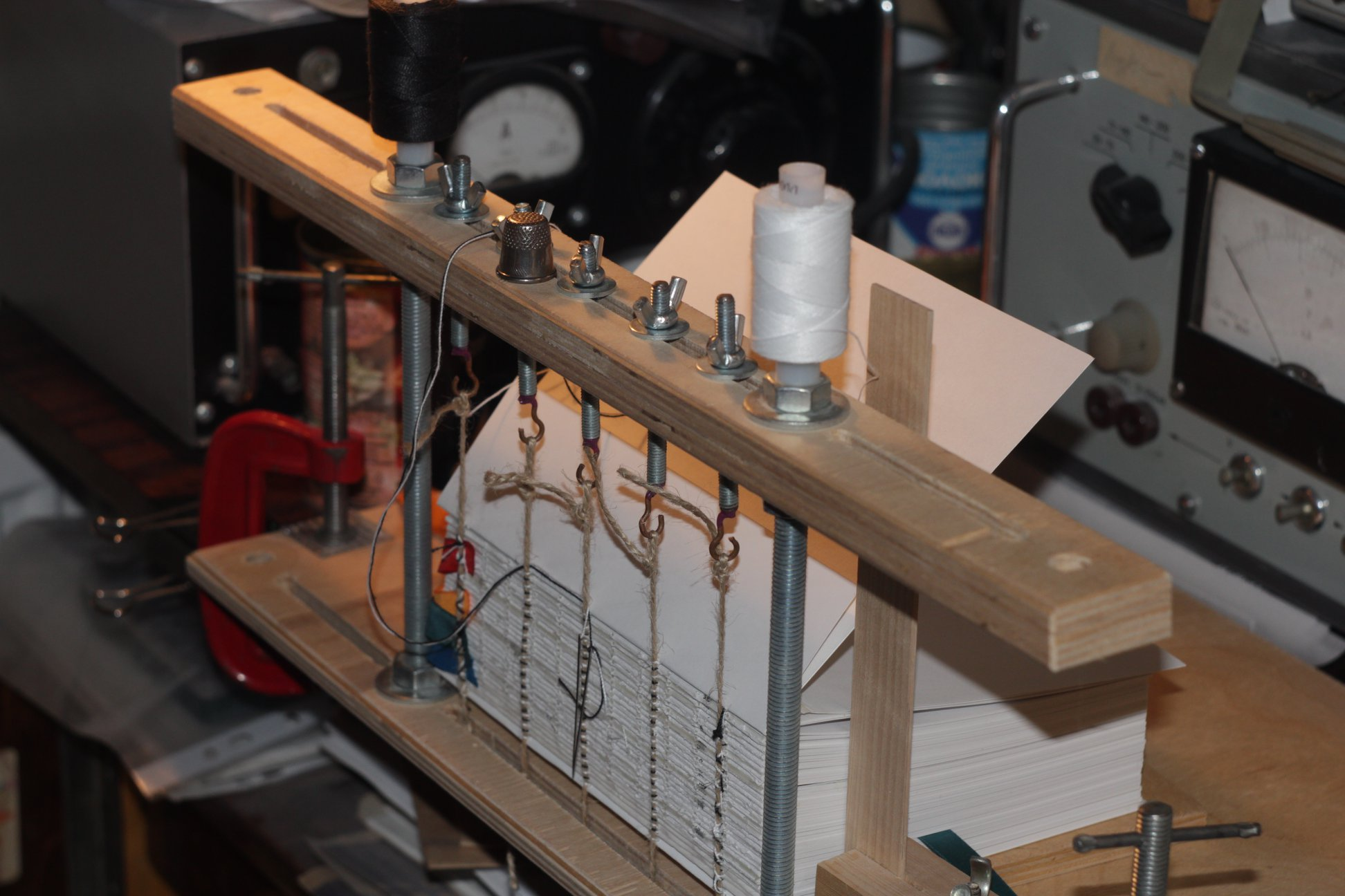 Один из вариантов конструкции станка для сшивания книг